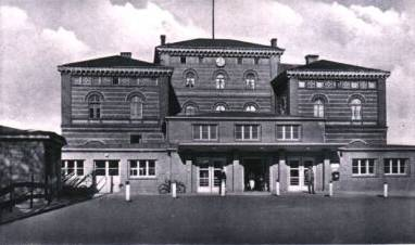 Der Bahnhof Cottbus vor dem Zweiten Weltkrieg. Cottbus, Brandenburg, Deutschland. andere Versionen